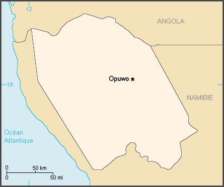 Description:Carte du Kaokoland Auteur:Rémih